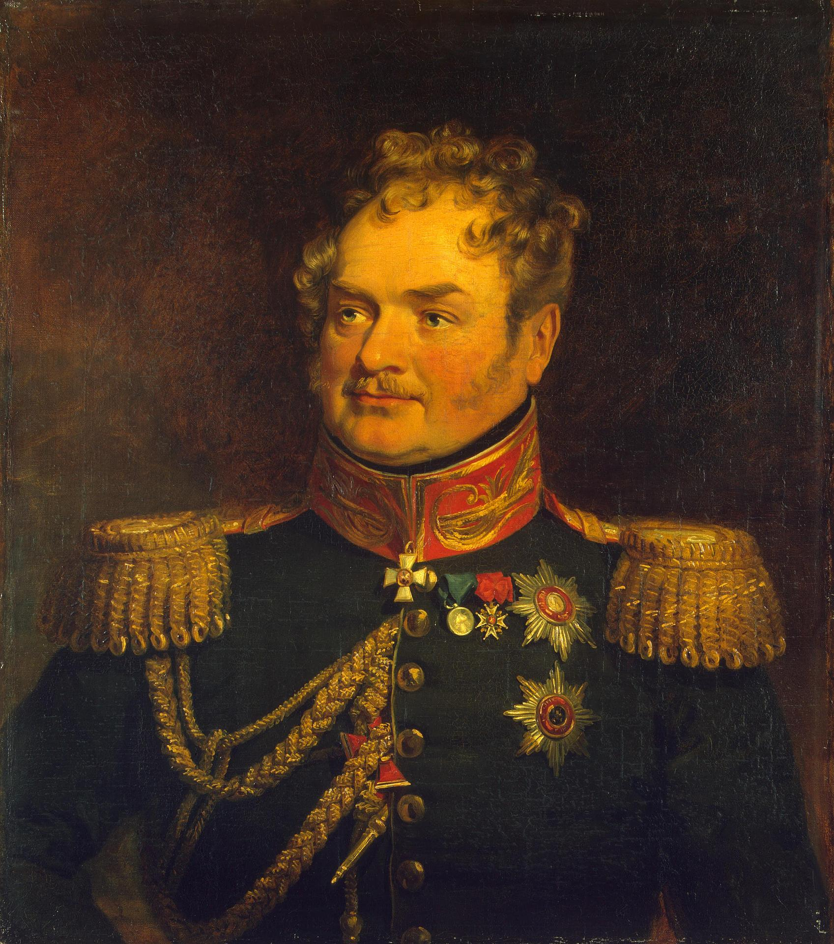 Karl Osipovich Lambert (De Lambert) (15.06.1773 – 30.05.1843) russian general